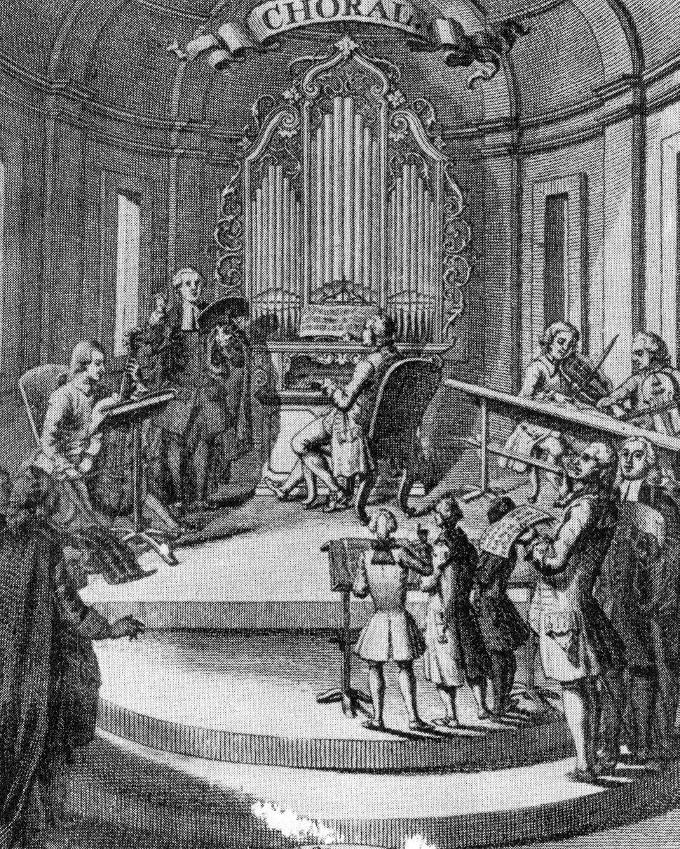 Stich von Johann Rudolf Holzalb 1767